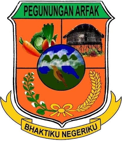 Diperoleh dari Situs Resmi Pemerintah Kabupaten Pegunungan Arfak